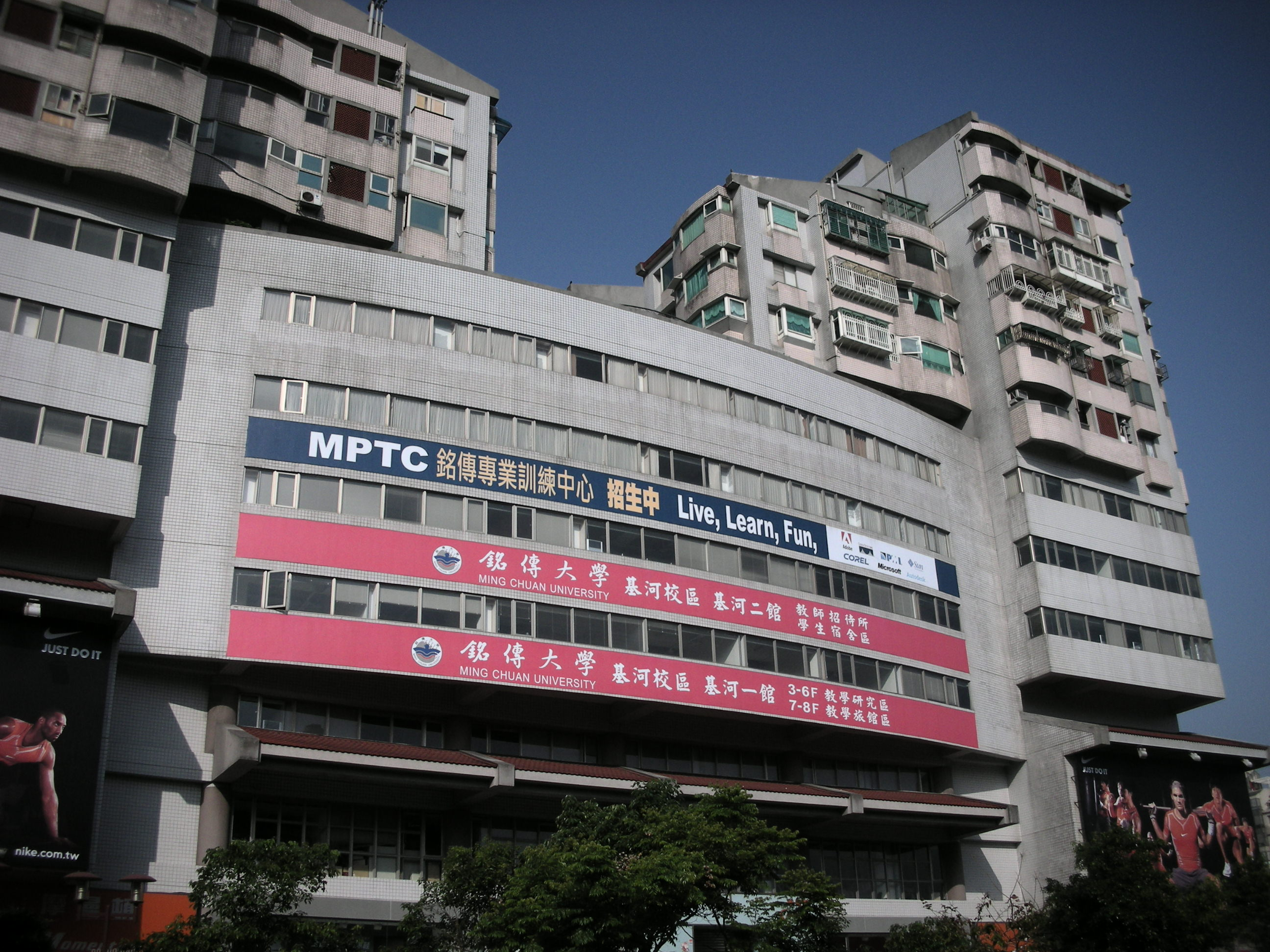 銘傳大學基河校區，位於臺北市士林區基河路130號3樓。